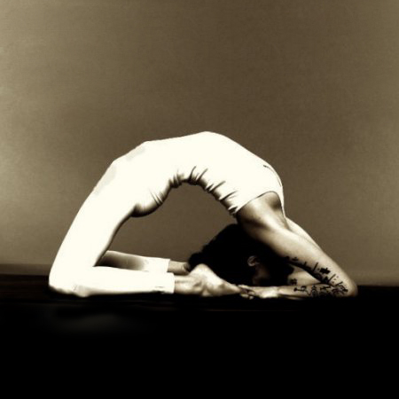 Kapotasana by Nina Mel, Yoga Teacher